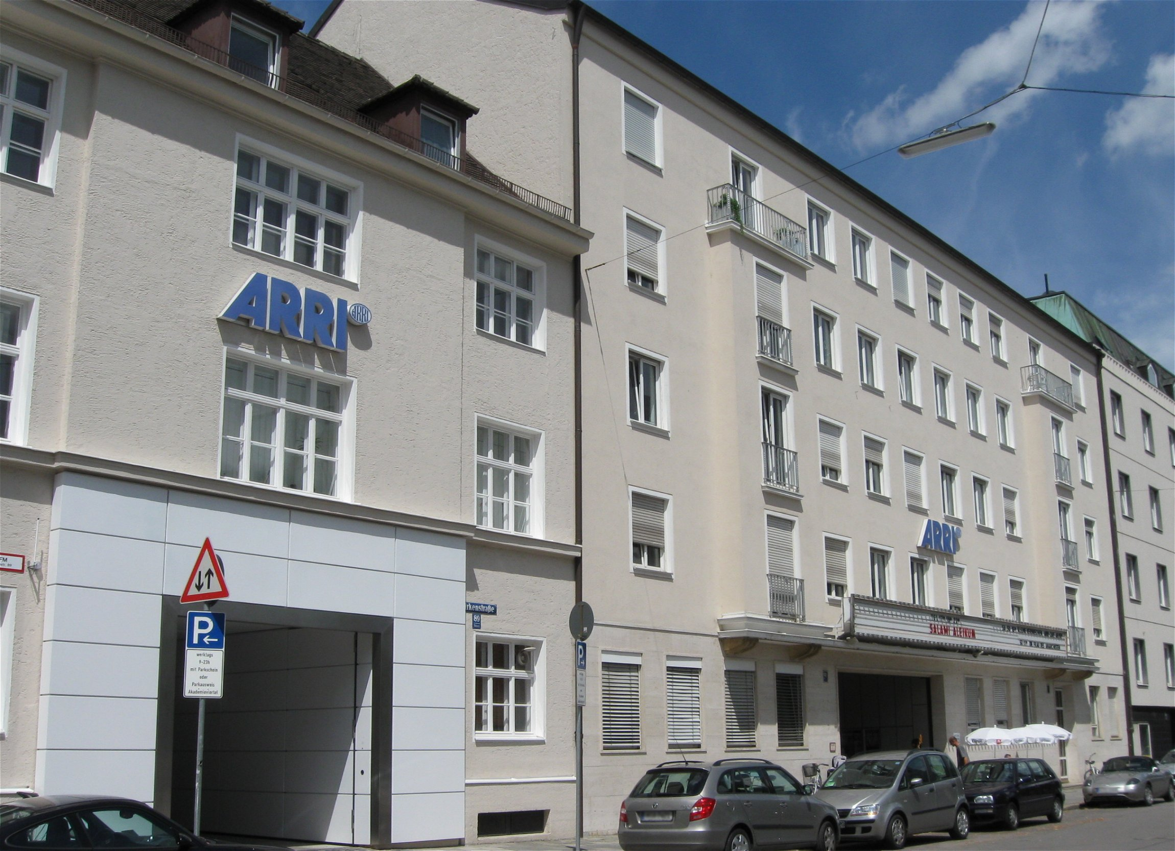 Firma ARRI, Türkenstr., München